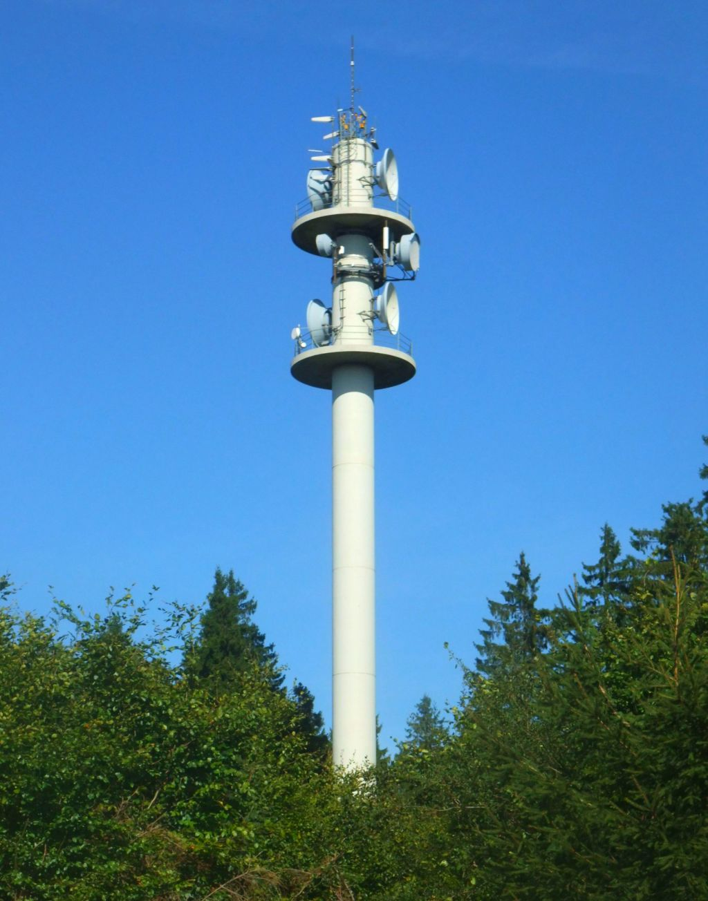 Funkanlage Rösterkopf